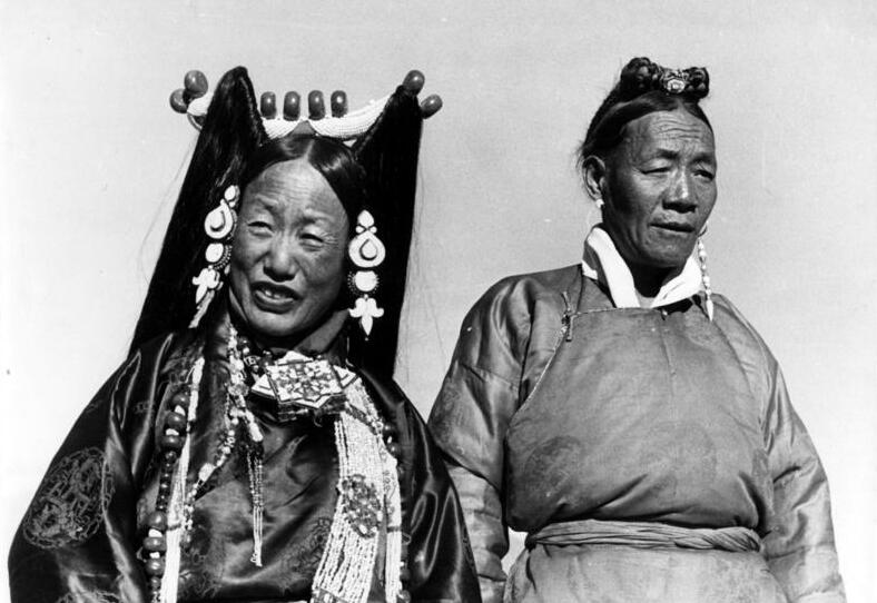 Lhasa, Minister und Gattin